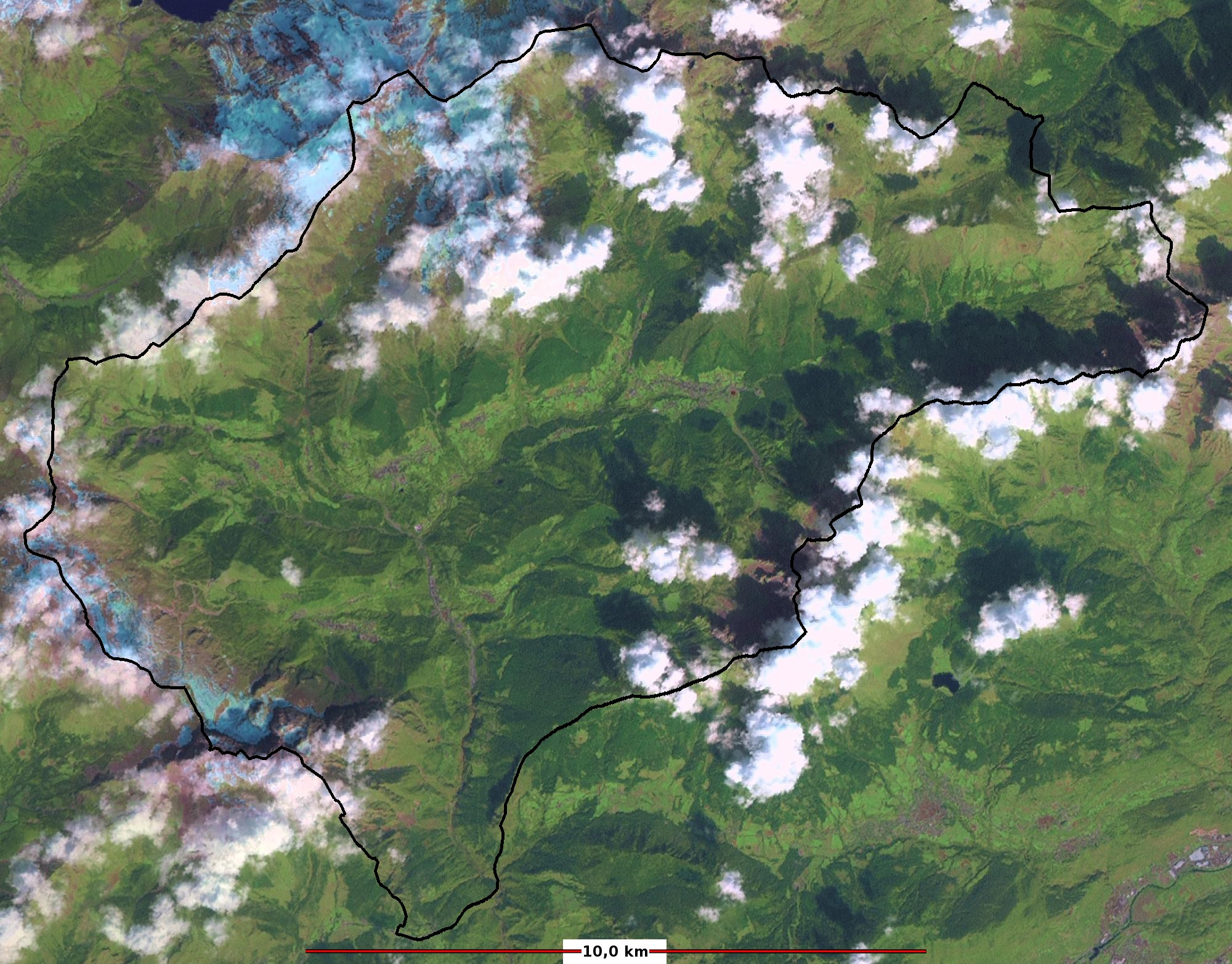 Vista dal satellite con evidenziati i confini della Comunità Montana di Scalve, Bergamo